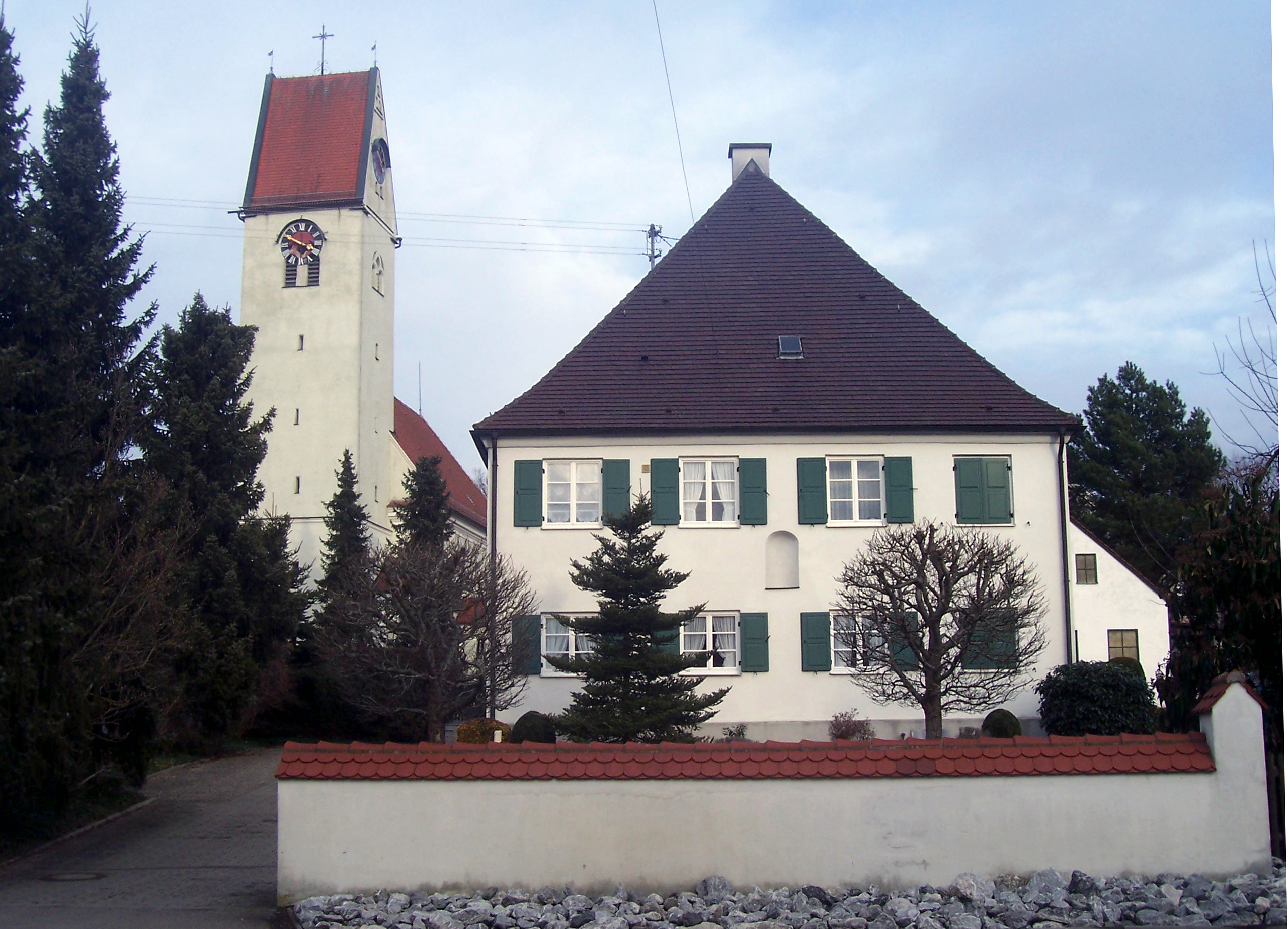 Pfarrhof und St. Martin in Obenhausen